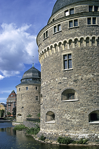 Bilden troligen från mitten av 1970-talet. Motiv: Örebro slott Nyckelord: Byggnadsminnen:Statl, Riksintressen Kategori: SlottBilden troligen från mitten av 1970-talet.